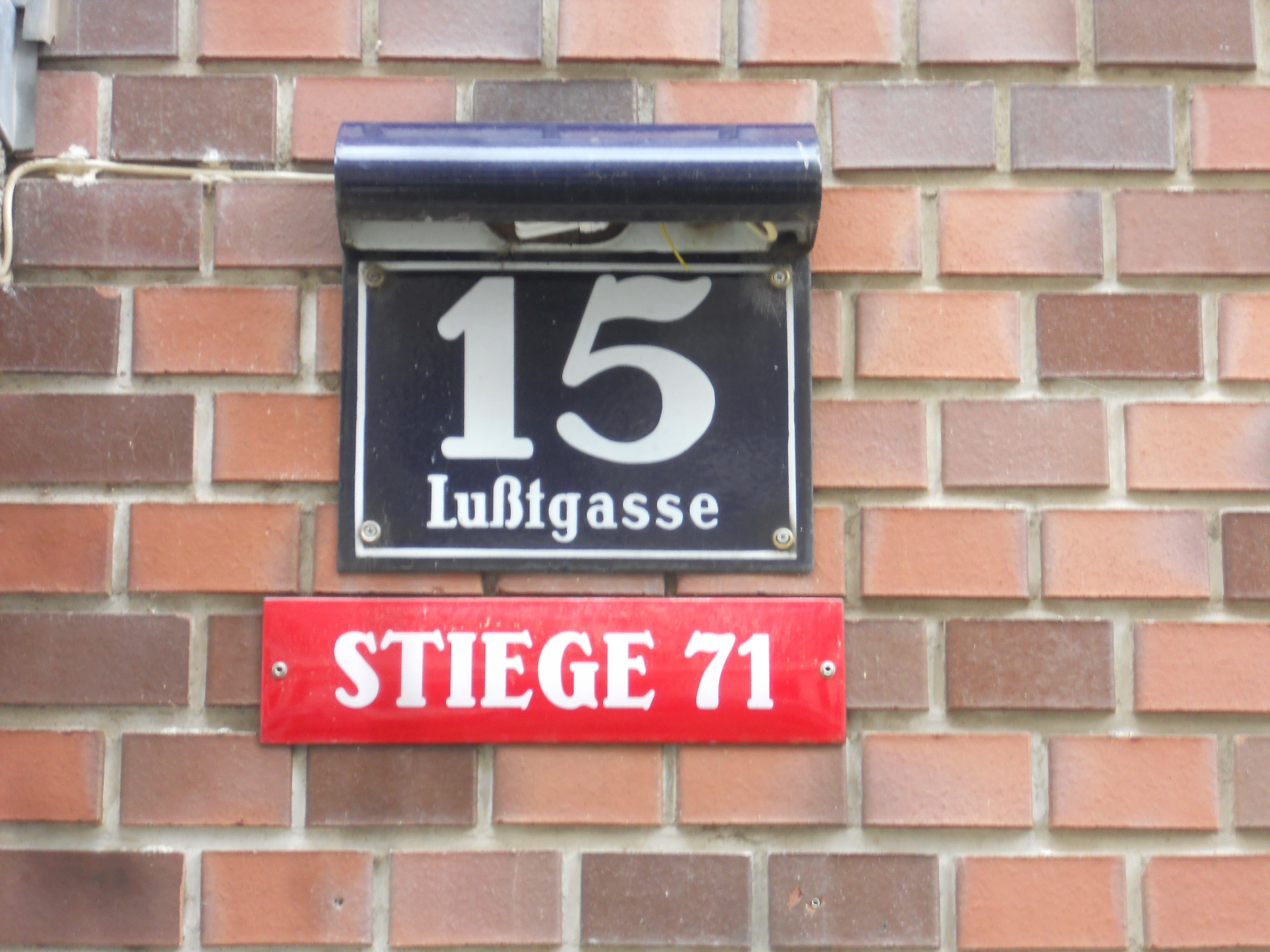 Haus nummer Lustgasse 15 in der Schreibweise "Lußtgasse"